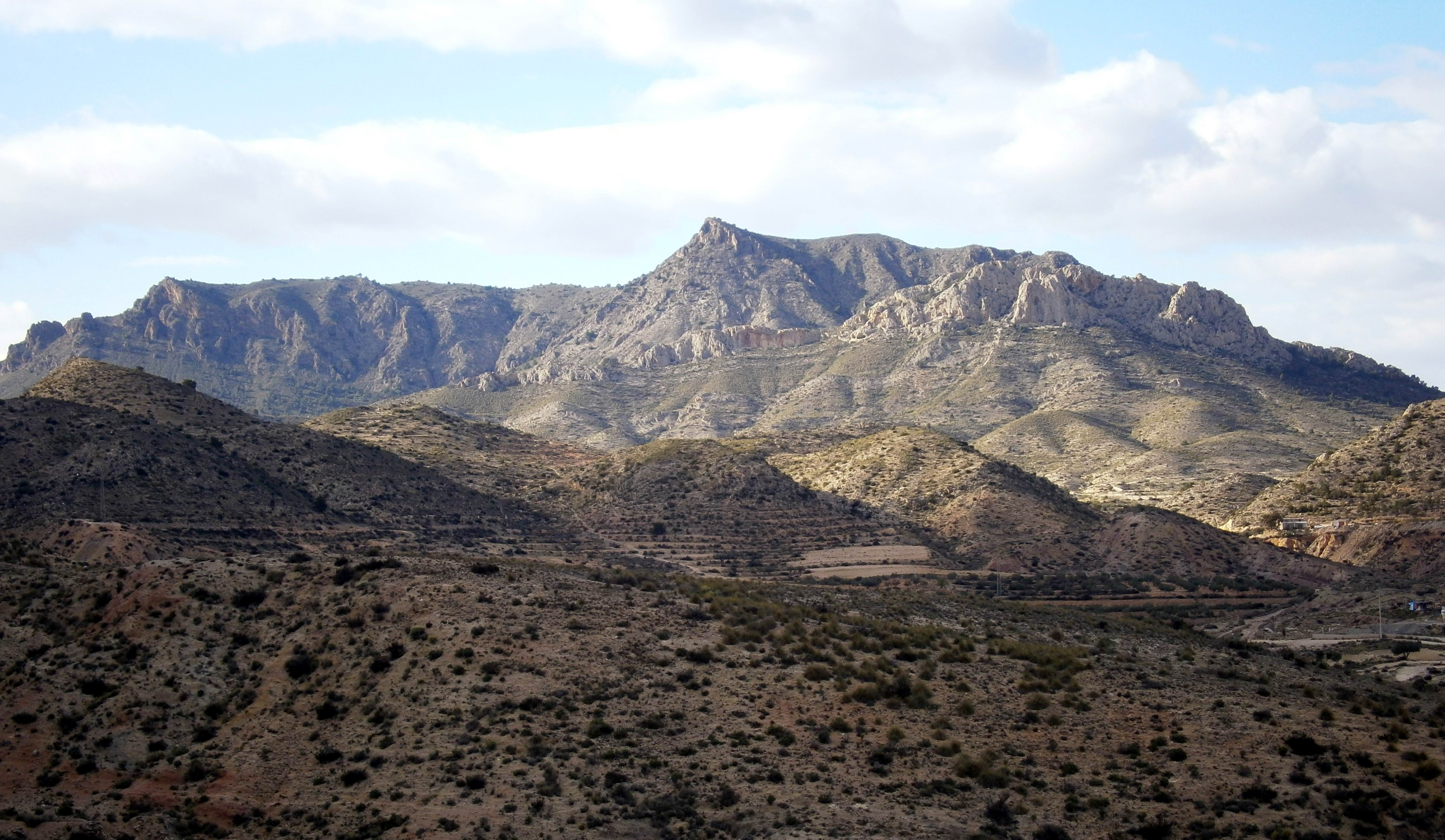 Sierra de Camara, desde Bolón